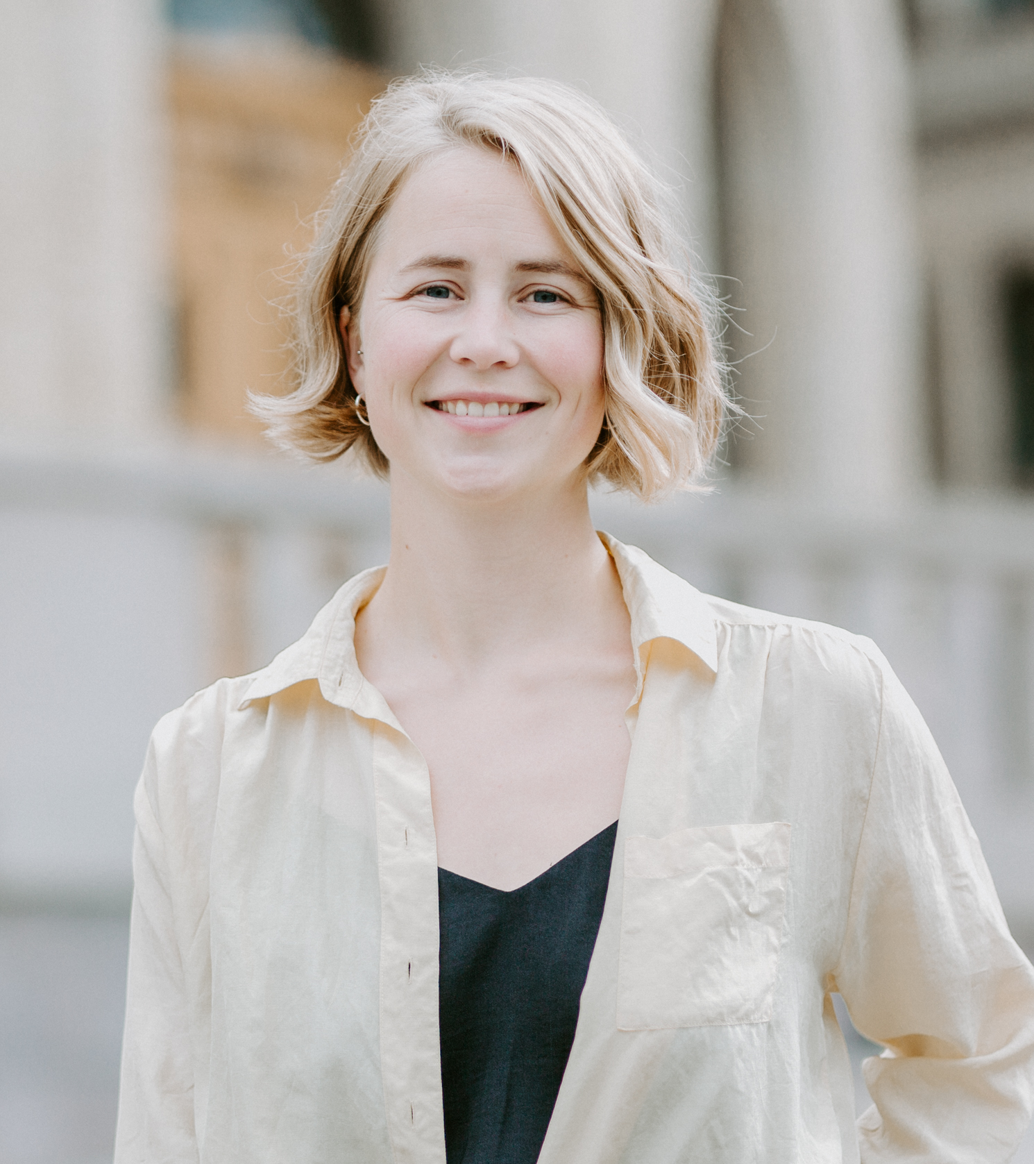 Pressfoto av Anja Bakken Riise